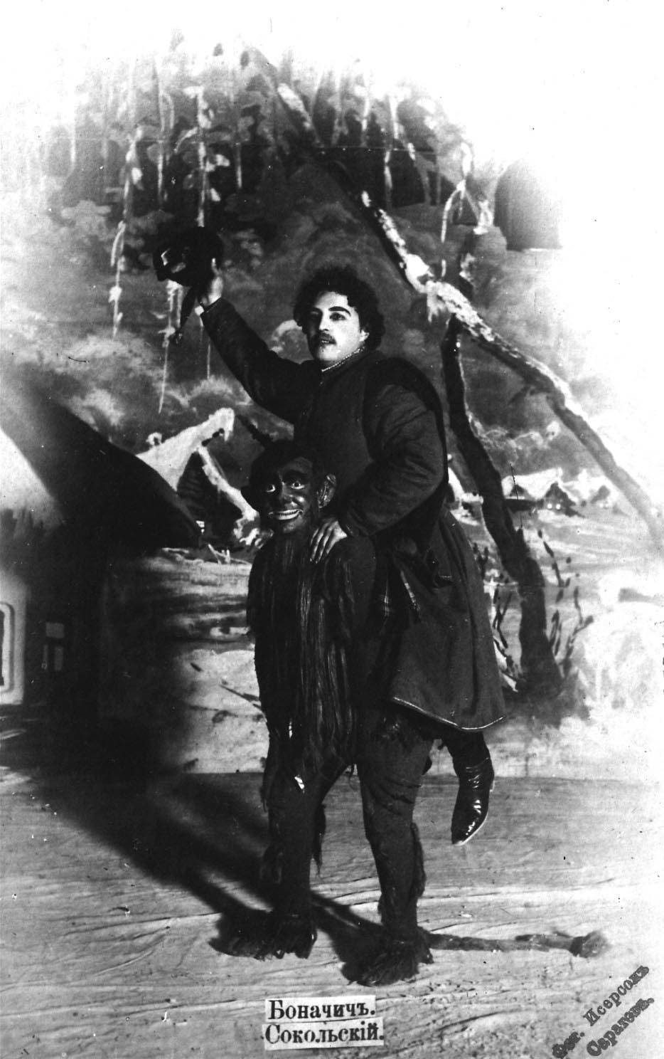 Боначич. Сокольский